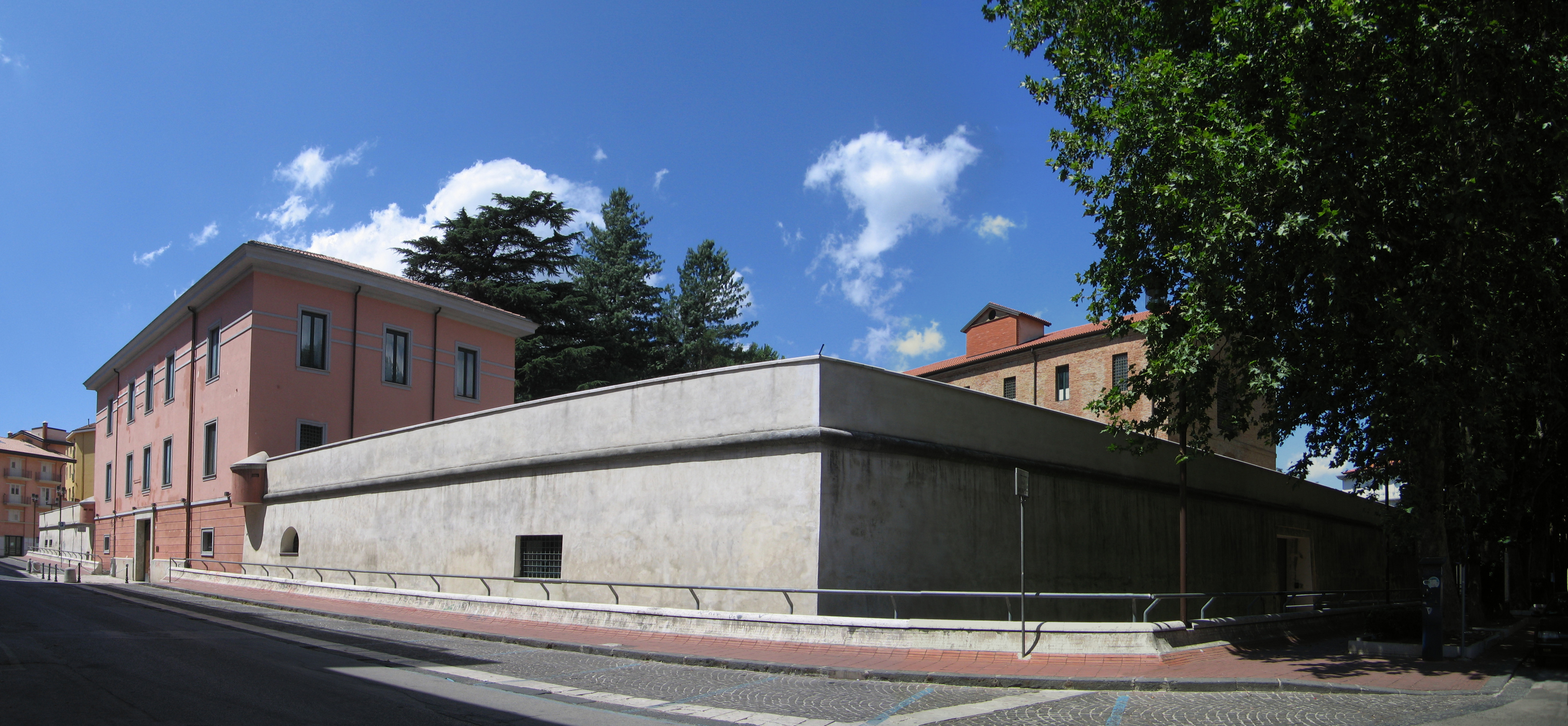 Carcere Borbonico - MIBAC This is a photo of a monument which is part of cultural heritage of Italy.